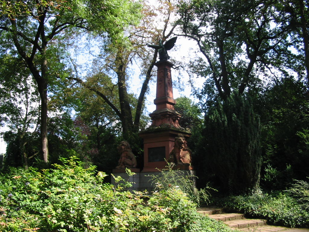 Schützenbrunnen im Mainzer Stadtpark zum 11. Deutschen Bundesschießen in Mainz im Juni 1894.